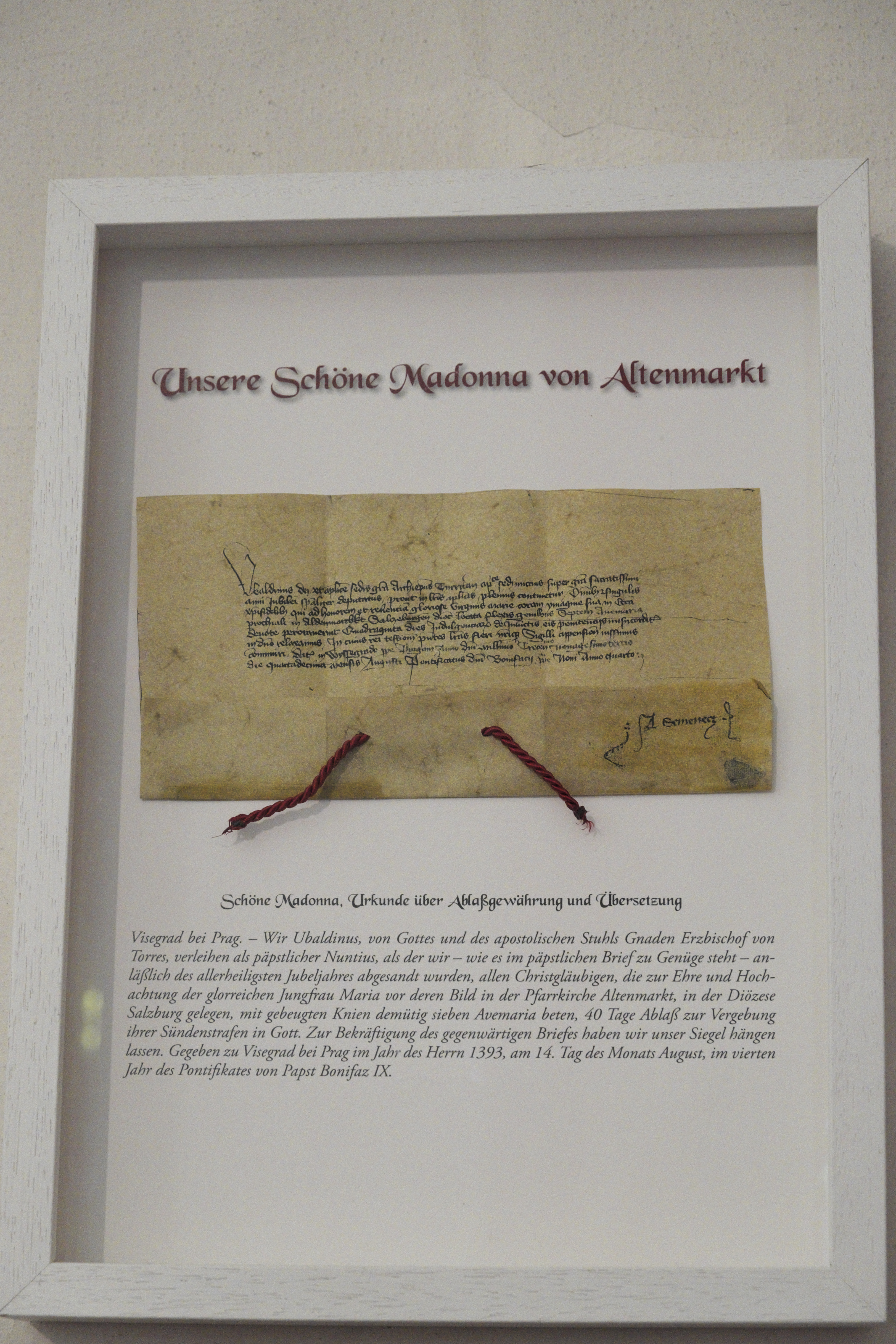 Katholische Pfarrkirche Unserer Lieben Frau Geburt in Altenmarkt im Pongau im Bundesland Salzburg (Österreich), Urkunde über Ablassgewährung